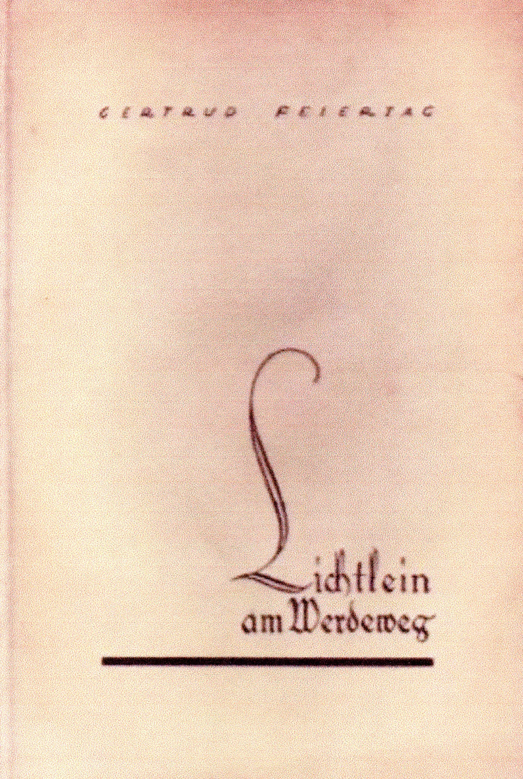 Titelblatt von "Lichtlein am Werdeweg"